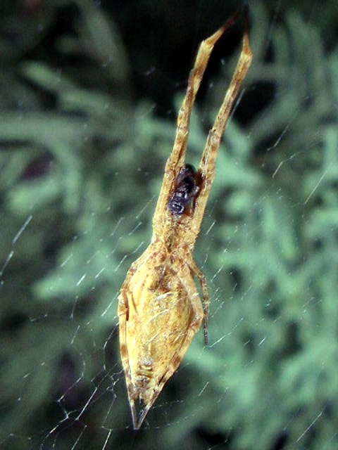 Uloborus walckenaerius (vista ventral), con presa en la boca. Alcorcón, Madrid.